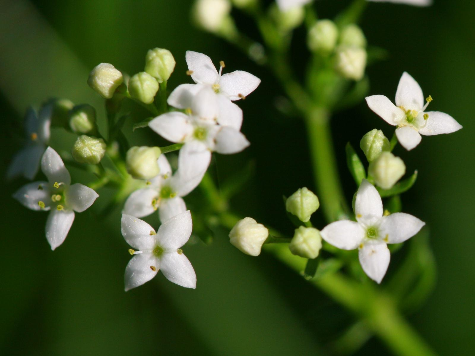 Harz-Labkraut (Galium harcynicum)